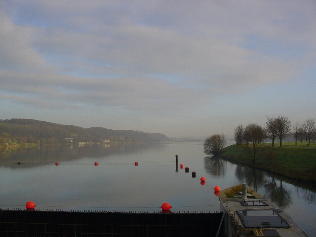 Blick über den Kemnader See in Witten-Herbede von der Stauwehrbrücke aus.